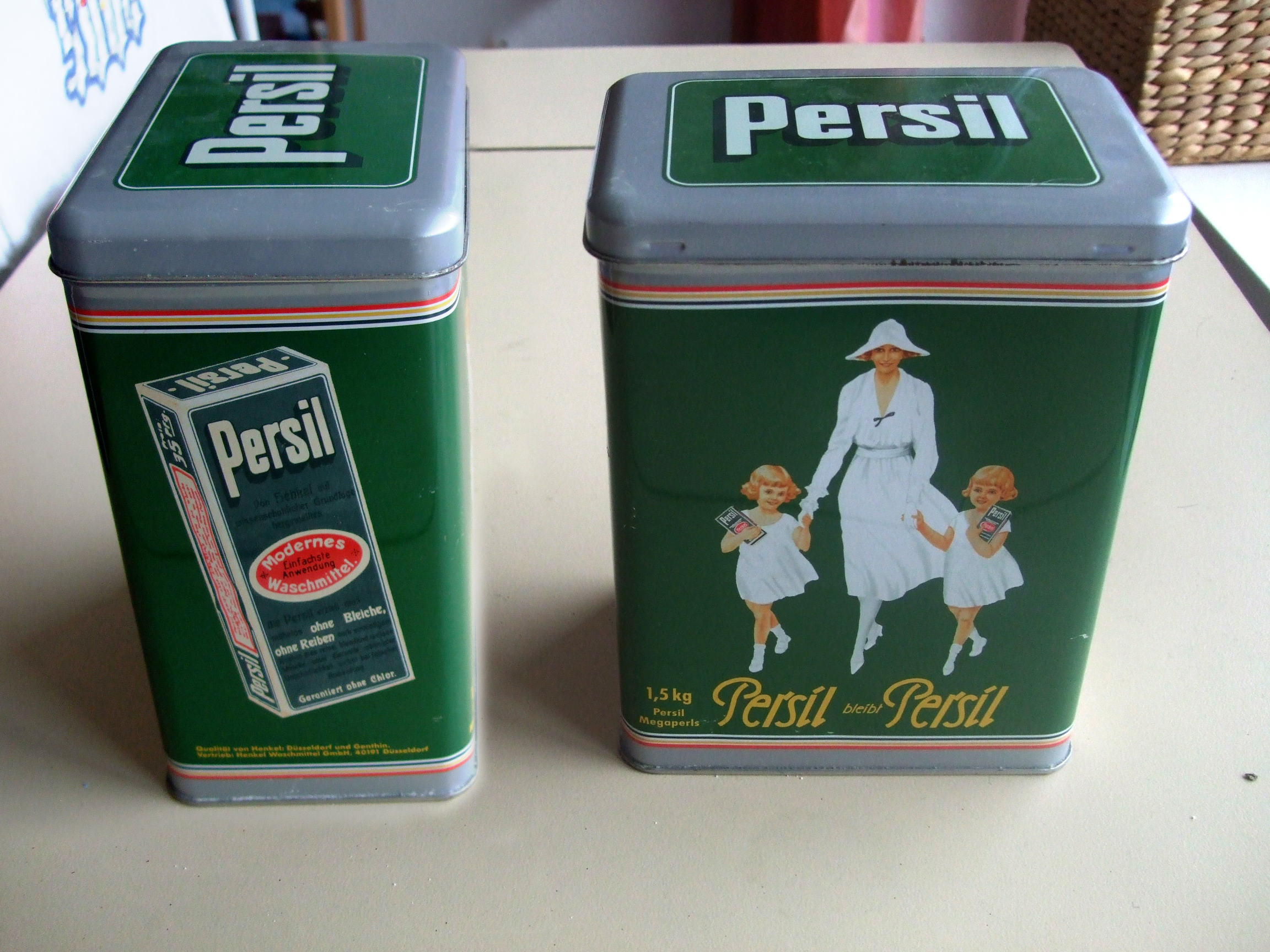 Eine Persil-Blechdose mit der weißen Dame als Zwillingsmutter. Der Slogan "Persil bleibt Persil" stammt aus dem Jahr 1913.